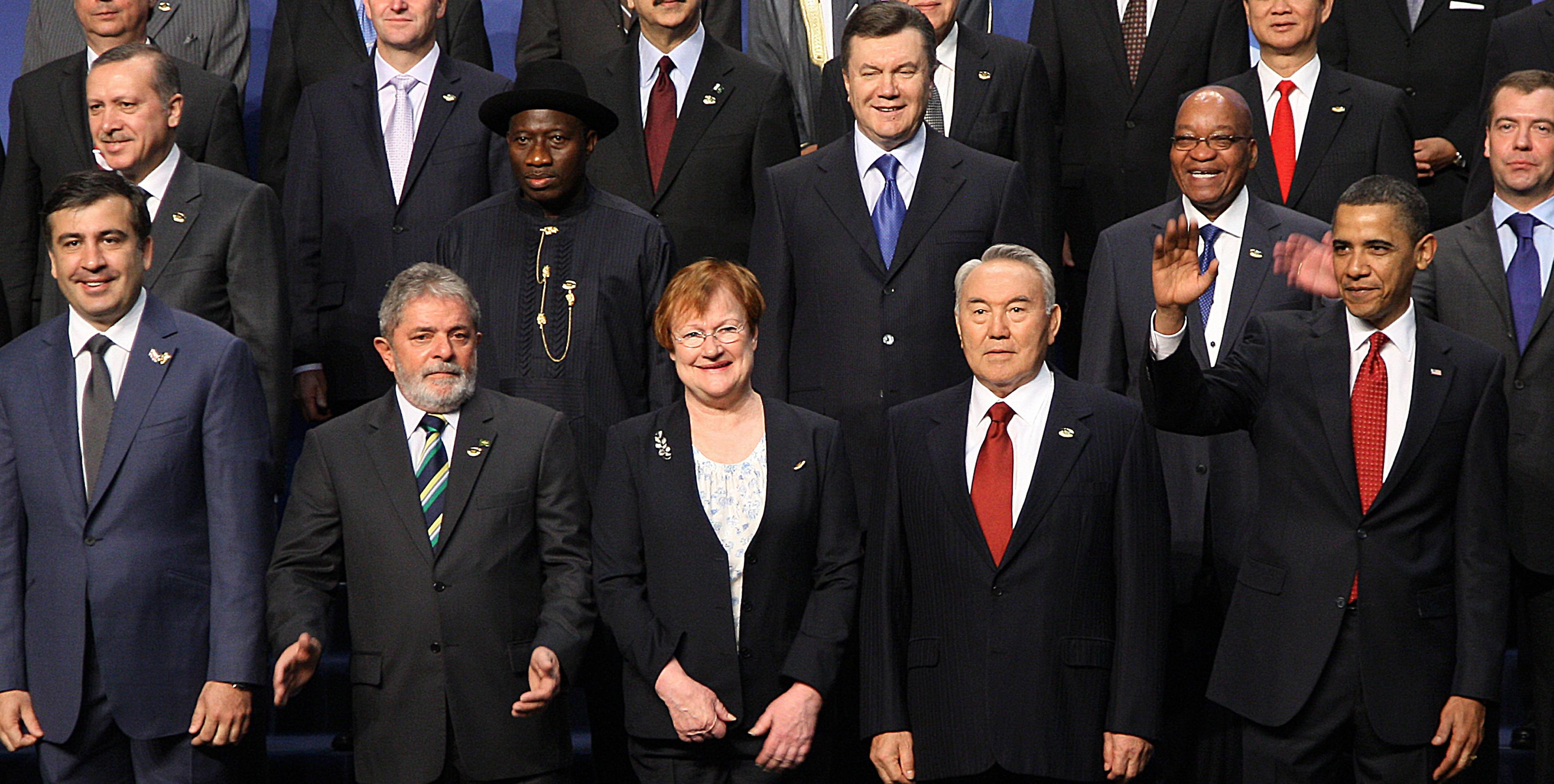 Washington (EUA) - Presidente Lula em foto oficial com participantes da Cúpula de Segurança Nuclear (Ricardo Stuckert/PR)